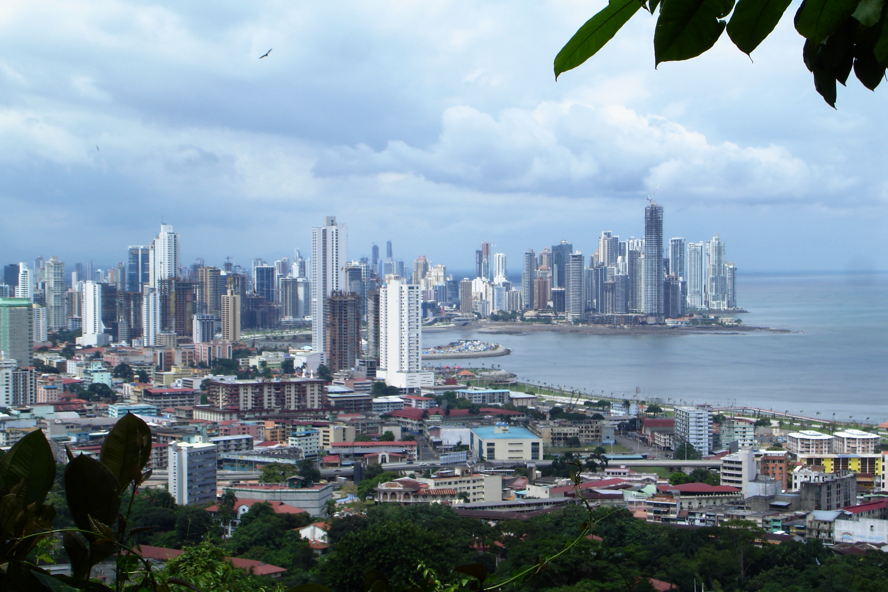 Panama Stadt August 2009